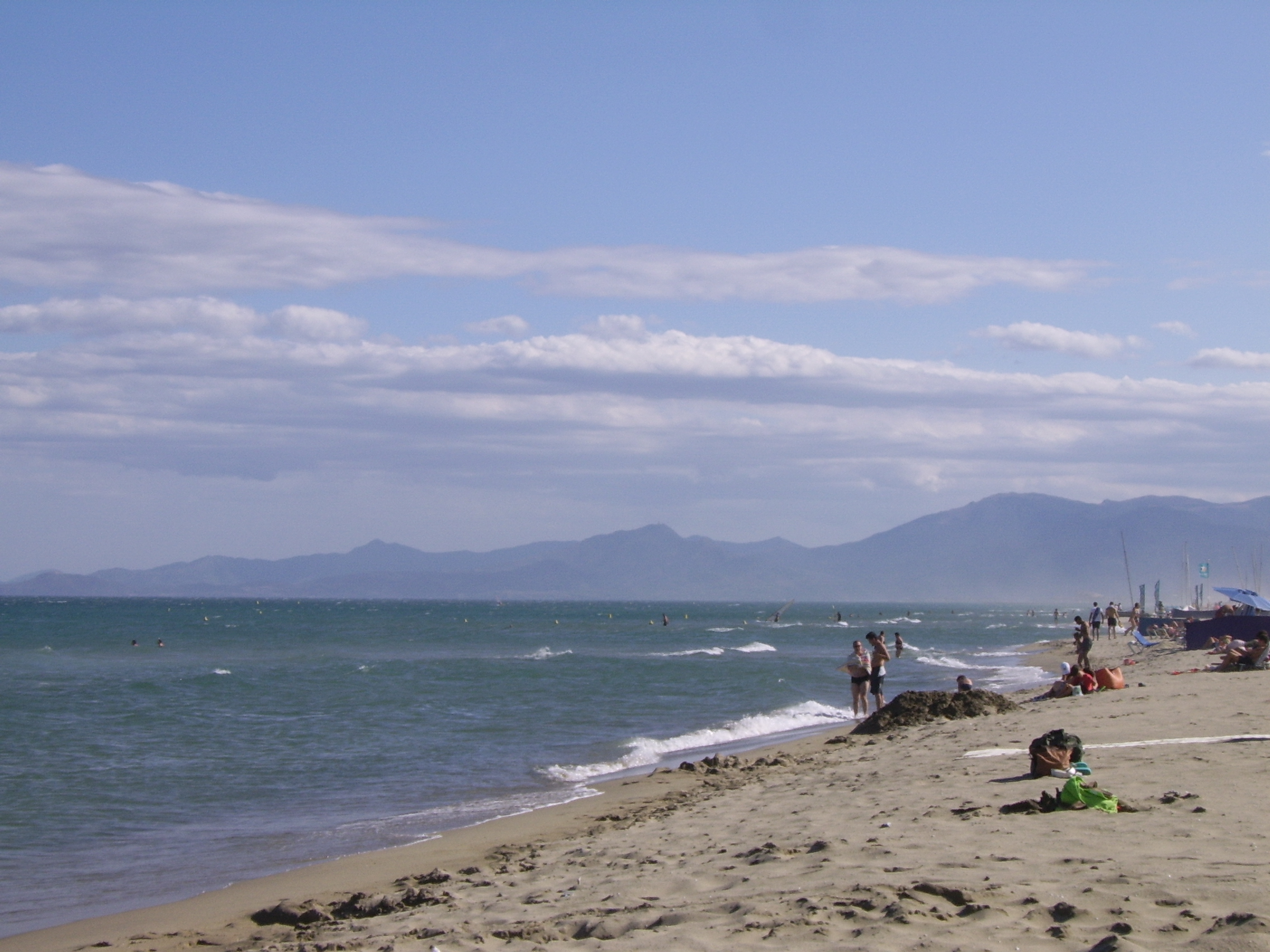 La plage. Canet-en-Roussillon, Pyrénées-Orientales, France.